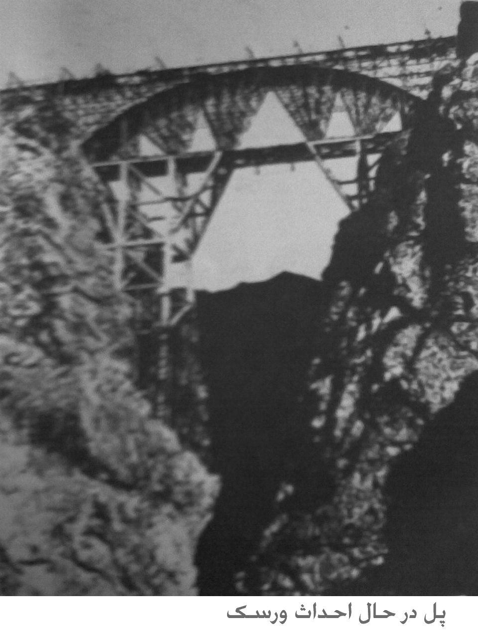 پل ورسک از کتاب سفرنامه مازندران تالیف رضاشاه چاپ 2535 شاهنشاهی عکسبرداری شده